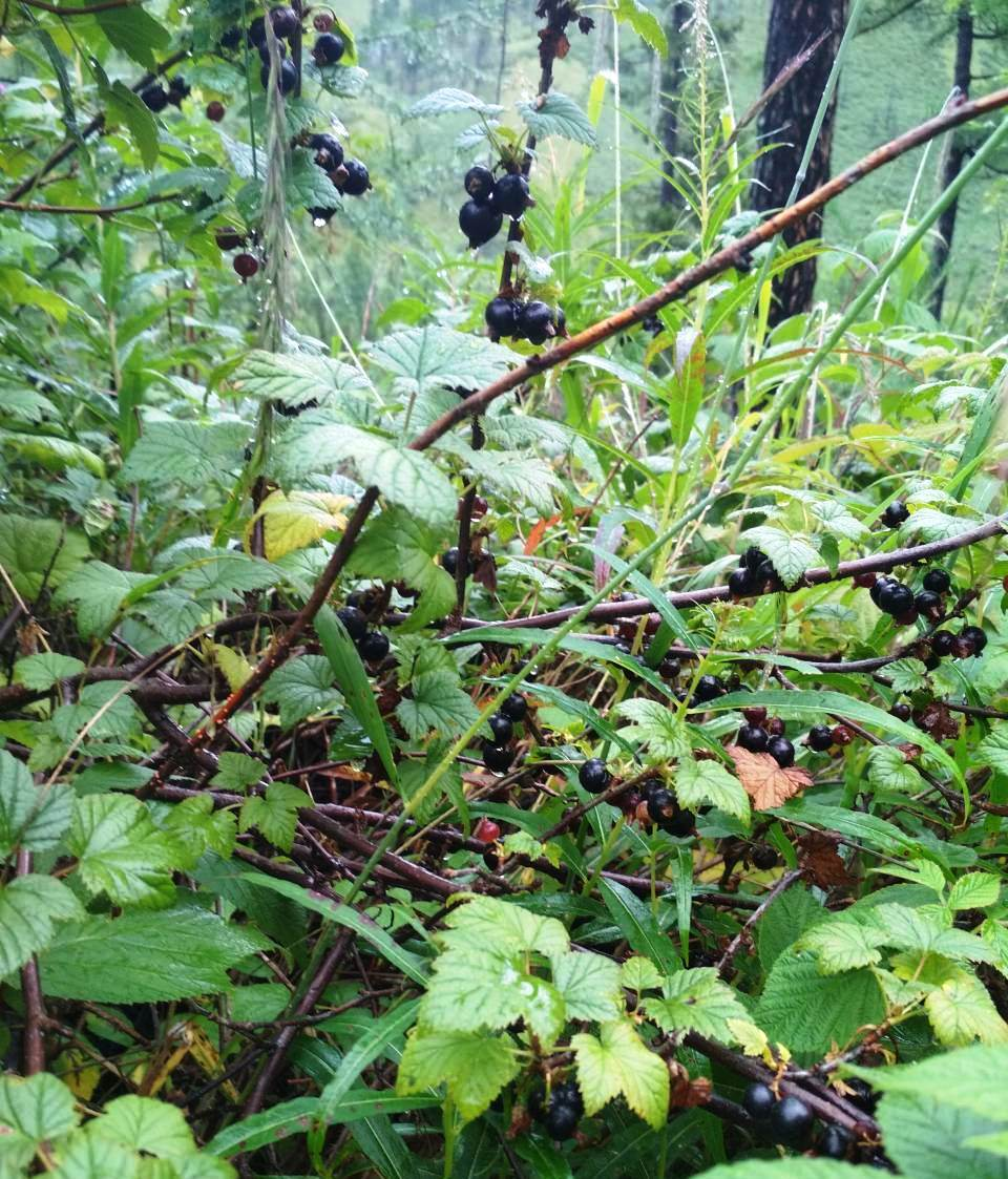 Black currant in the mountains of Zakamensky district of Buryatia, Russia